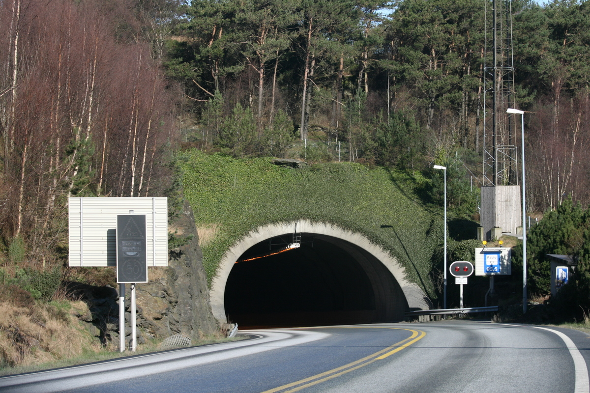 Byfjordtunnelen